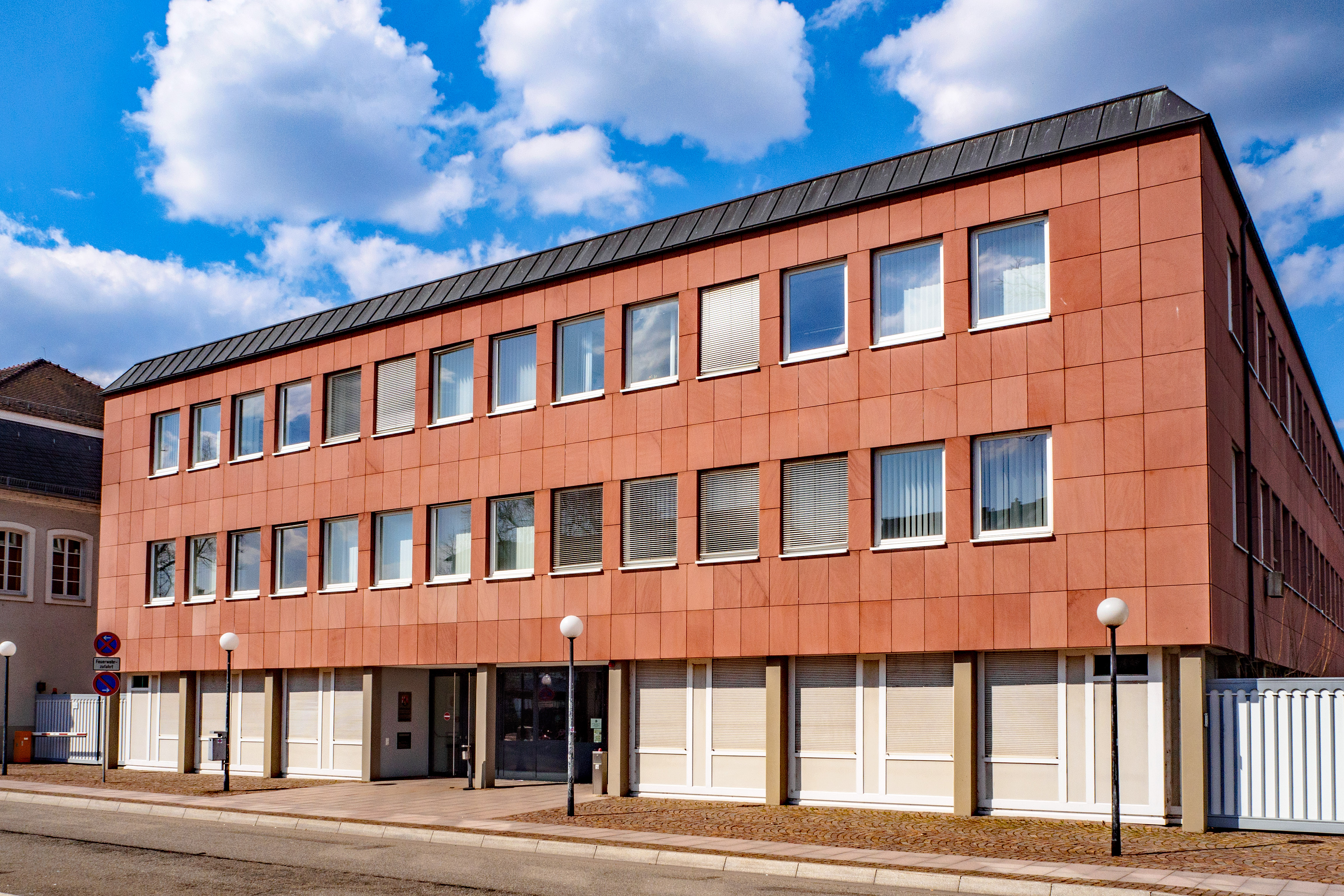 Landgericht und Staatsanwaltschaft Zweibrücken, Goetheplatz 2